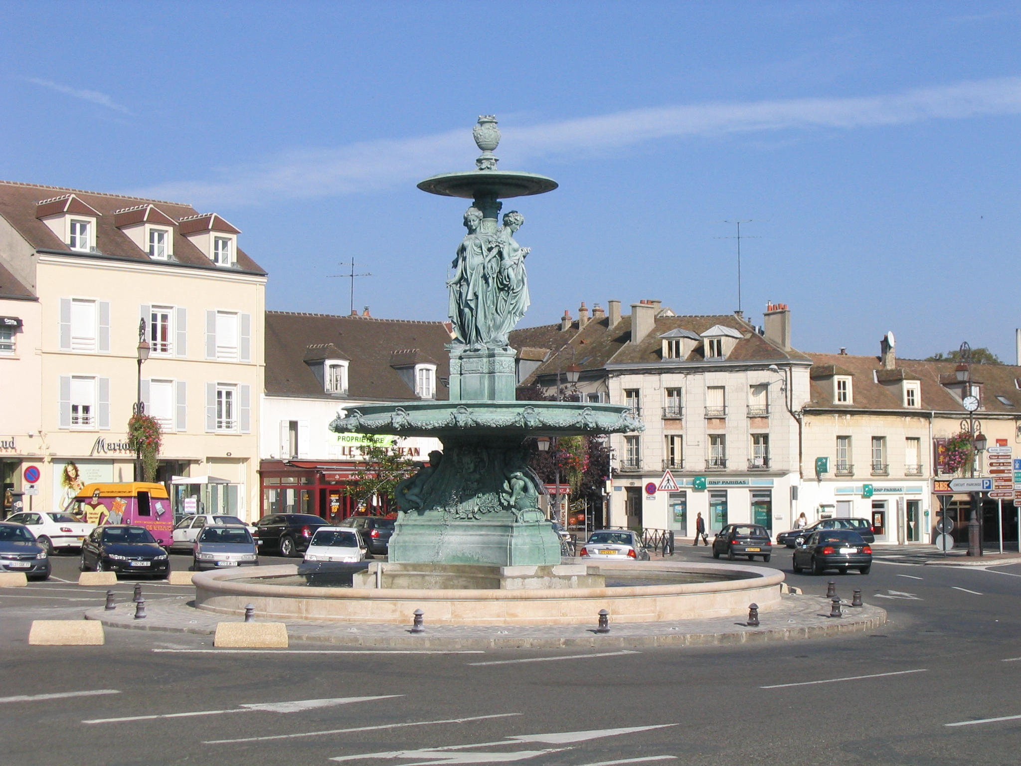 La place Saint-Jean et sa fontaine à Melun (Seine-et-Marne, Île-de-France, France).